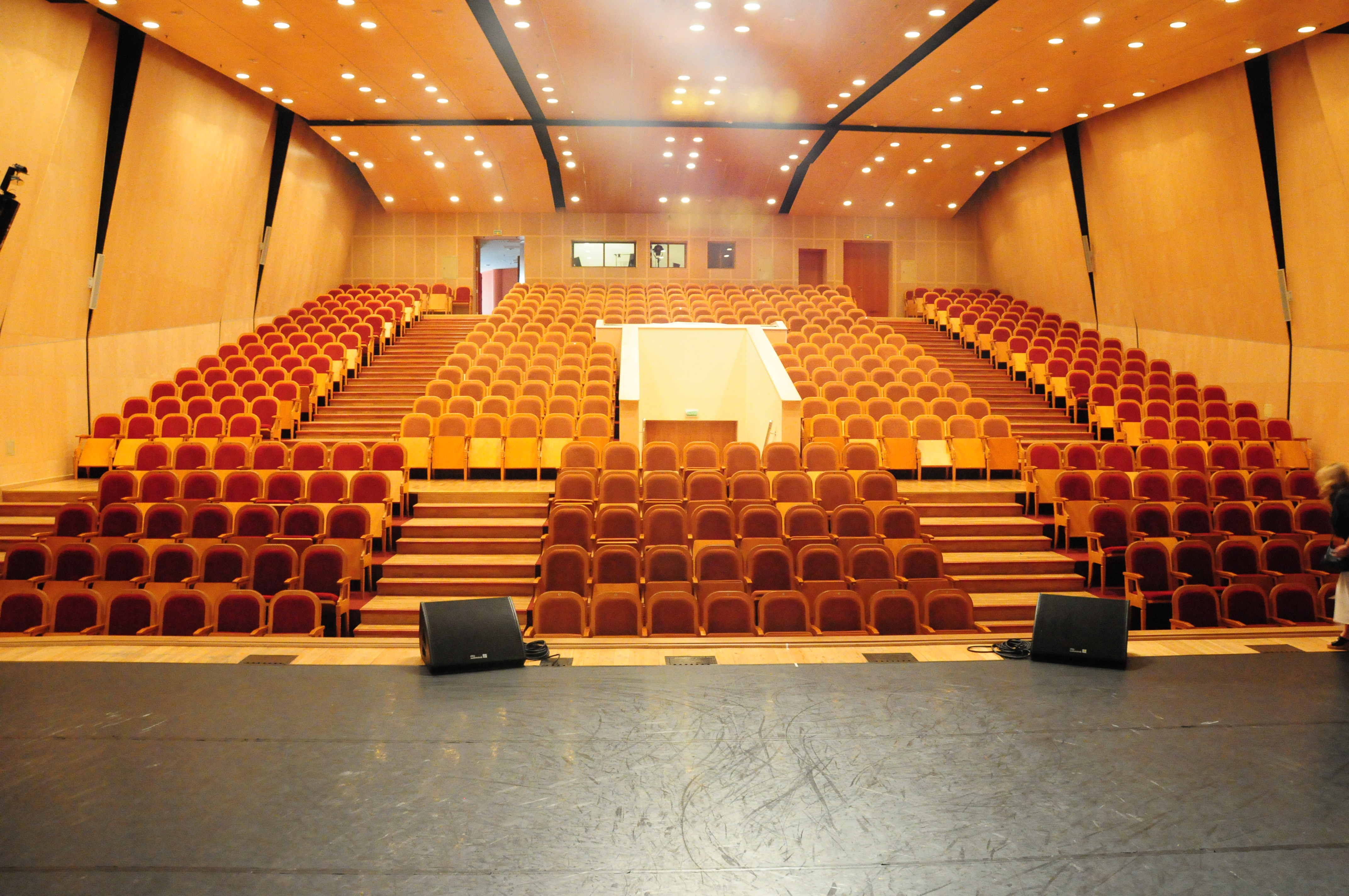 Большой зал (472 места)